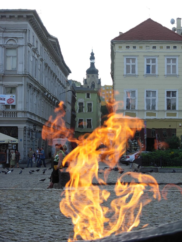 Stary Rynek w Bydgoszczy